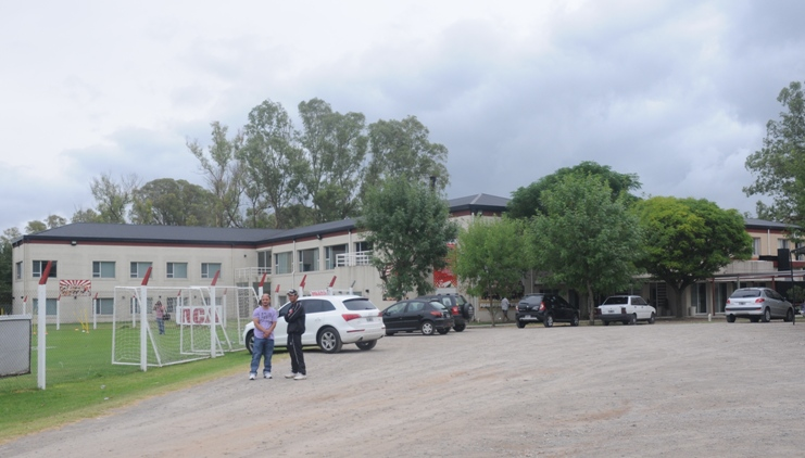 La concentración para futbolistas del Country Club de Estudiantes de La Plata.